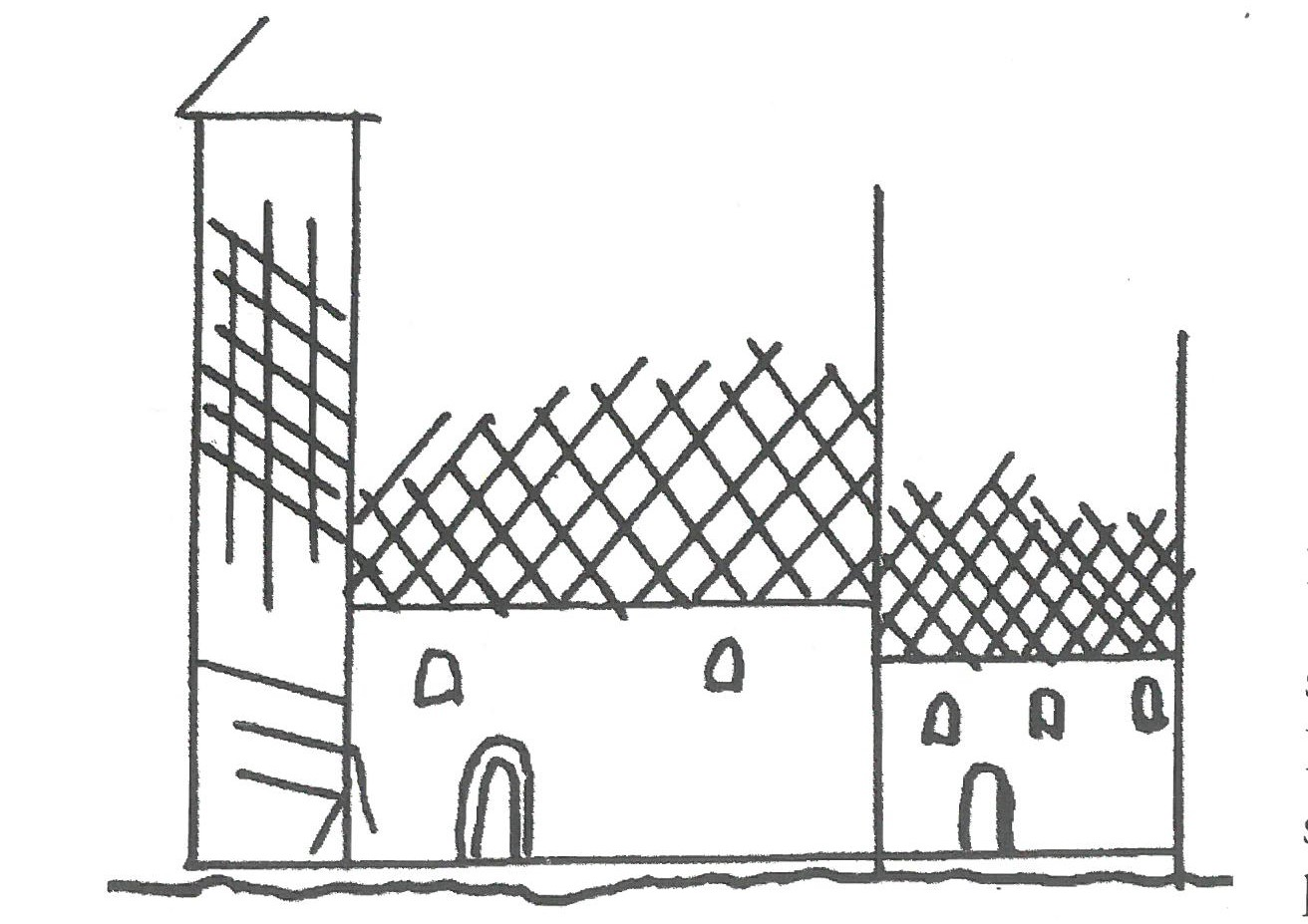 Skisse av Sakshaug gamle kirke, Inderøy, Nord-Trøndelag, Norway. Udatert innrissing på sokkel til dør mellom kirkens kor og sakristi